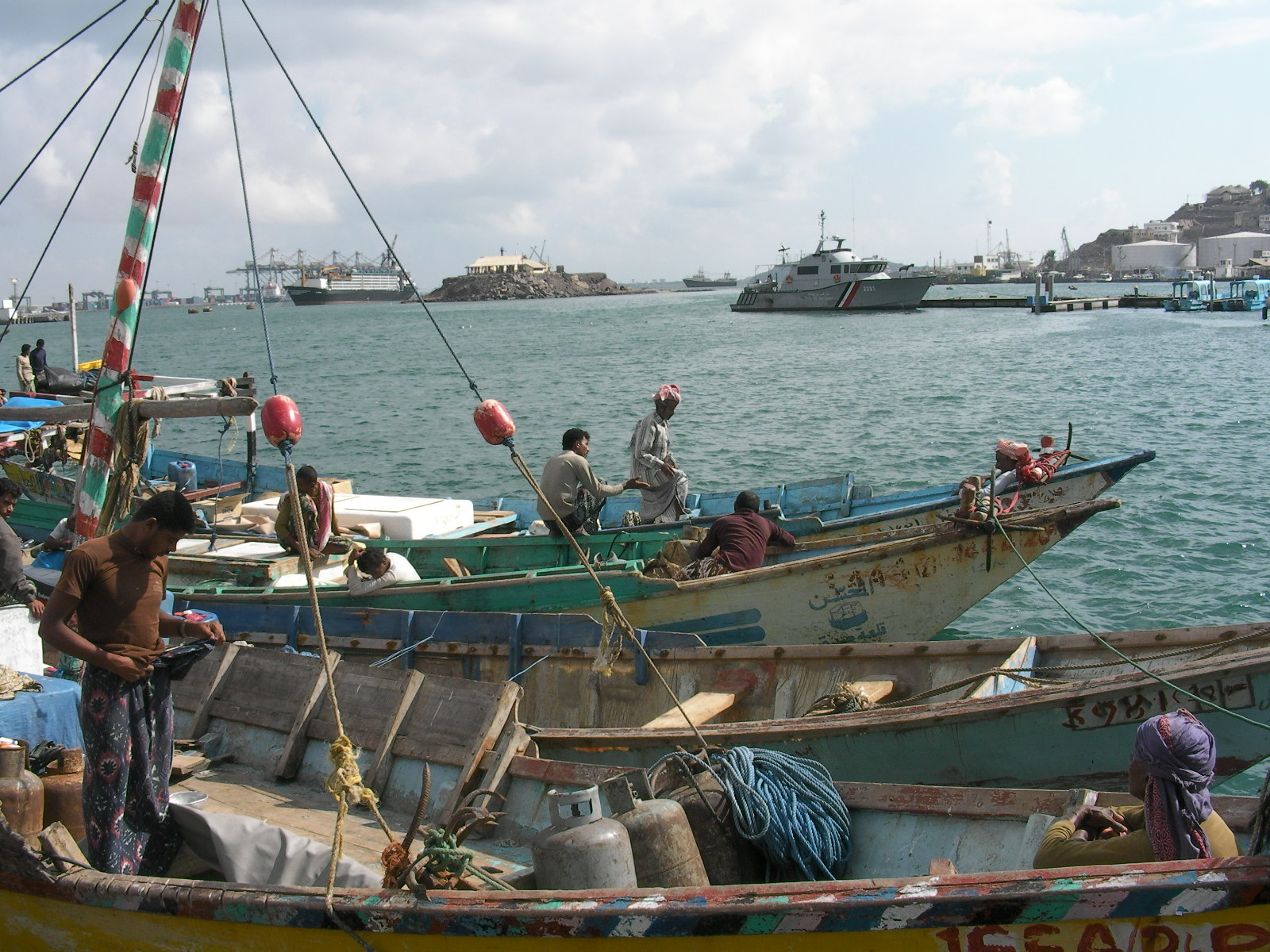 예멘의 경제